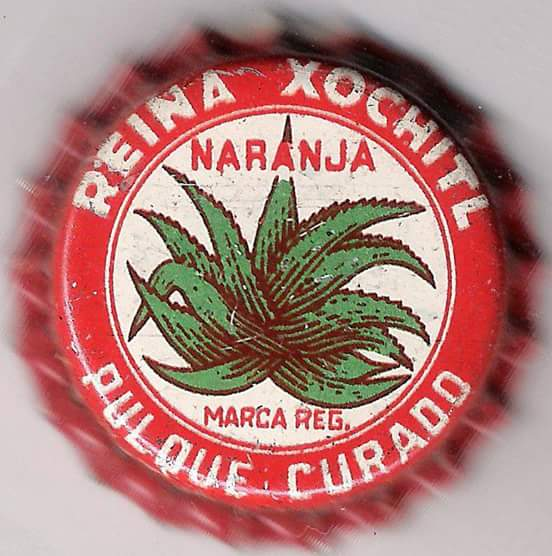 Corcholata mexicana de Pulque embotellado Reina Xóchitl sabor Naranja